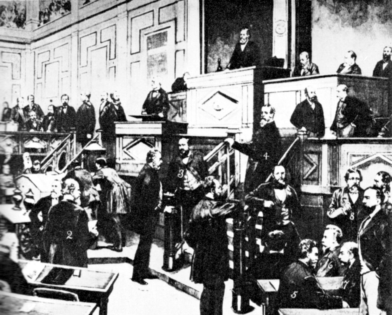 Reichstagssitzung